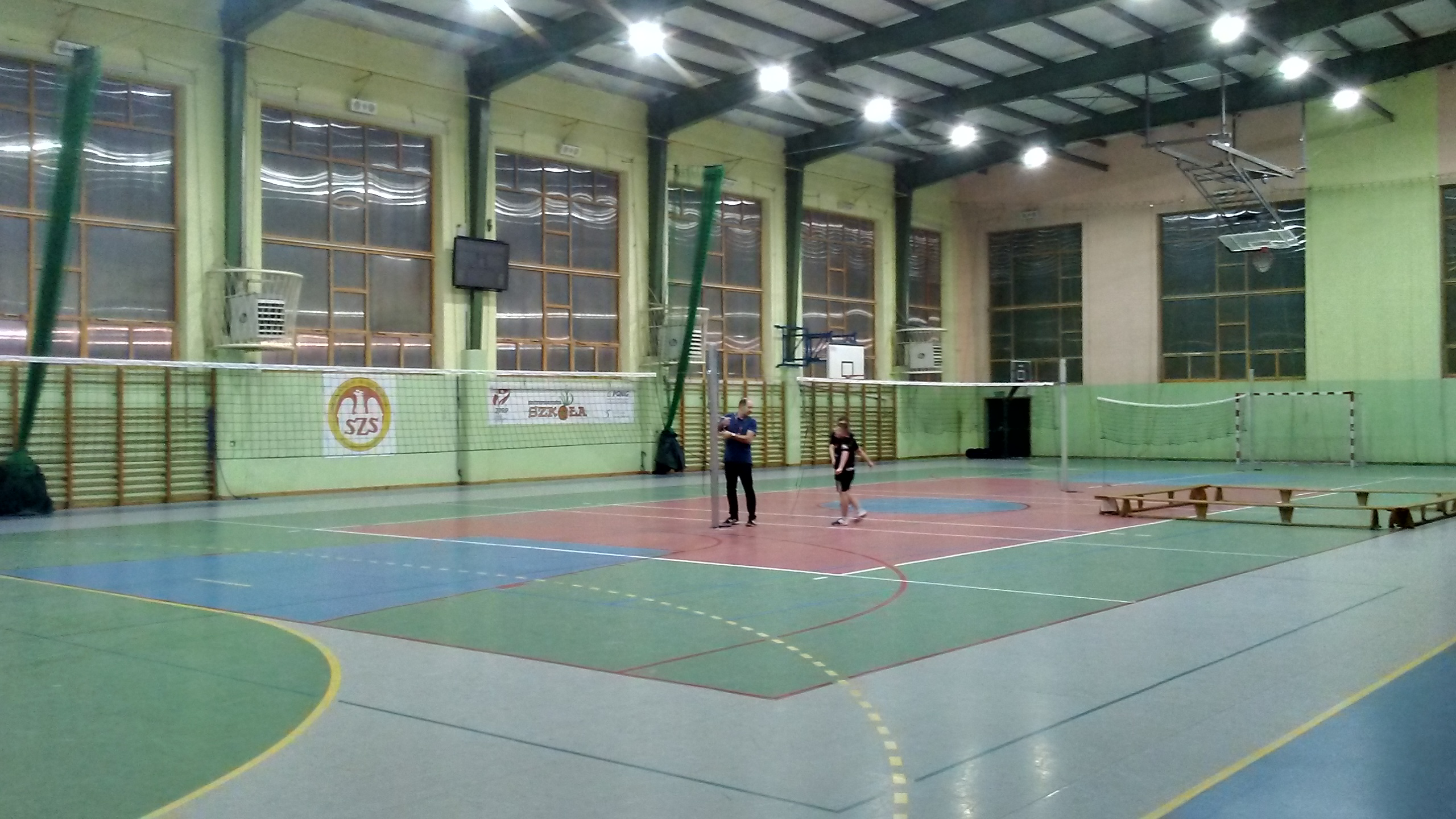 Wewnattrz hali sportowej przy SP1 im Aleksandra Kamińskiego w Tomaszowie Mazowieckim (rok zał. szkoły 1919)